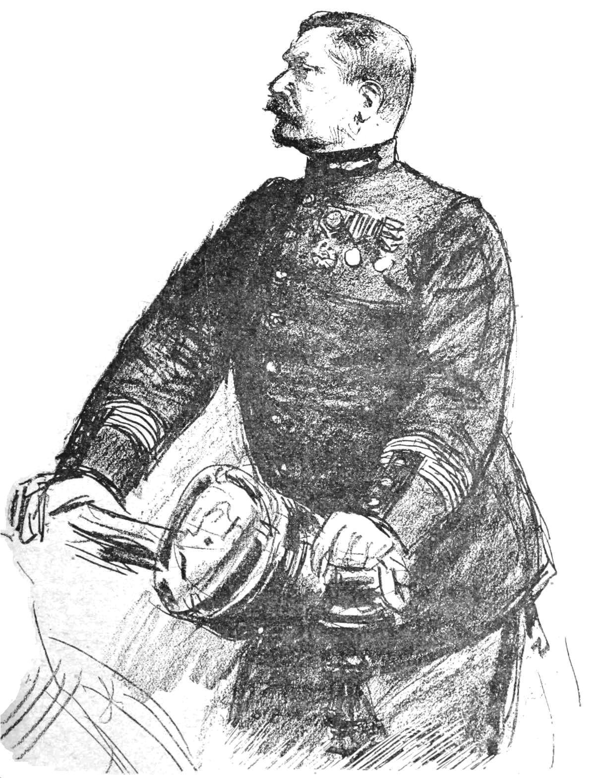 "M. le Lieutenant-Colonel Henry." (Dixième audience du procès Zola)